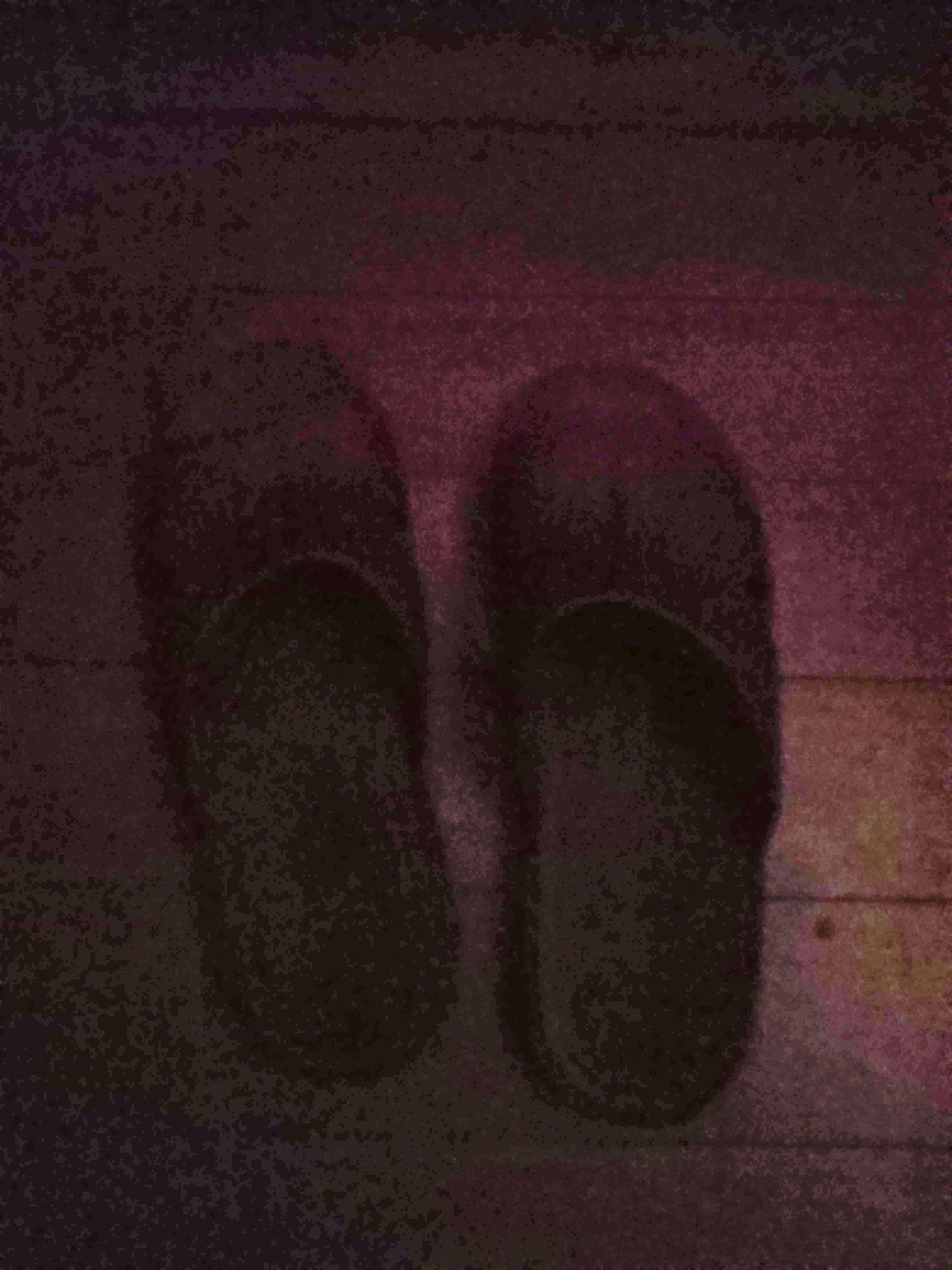 Unas chanclas de color café oscuro.